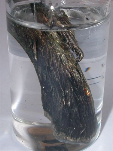 Bildbeschreibung: Strontium in dendritischer Form, stark oxidiert, teilweise ist metallischer Glanz erkennbar Quelle: Foto aus meiner Elementesammlung Fotograf: Tomihahndorf Datum: April 2006